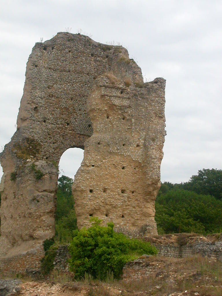 Théâtre gallo-romain de la cité de Lemonum, Naintré, Poitou, FranceBrezhoneg: C'hoariva Lemonum, ker gallian-roman, Naintré, Poetou, Bro C'Hall .